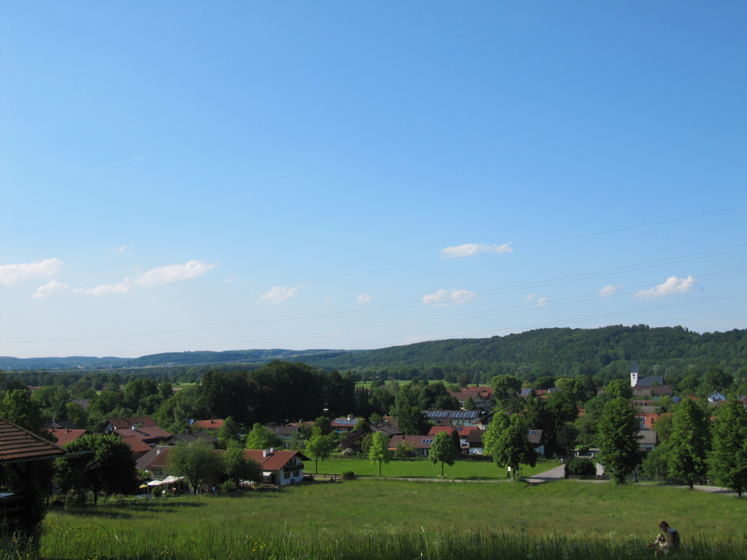 Vagen aus Richtung Irschenberg